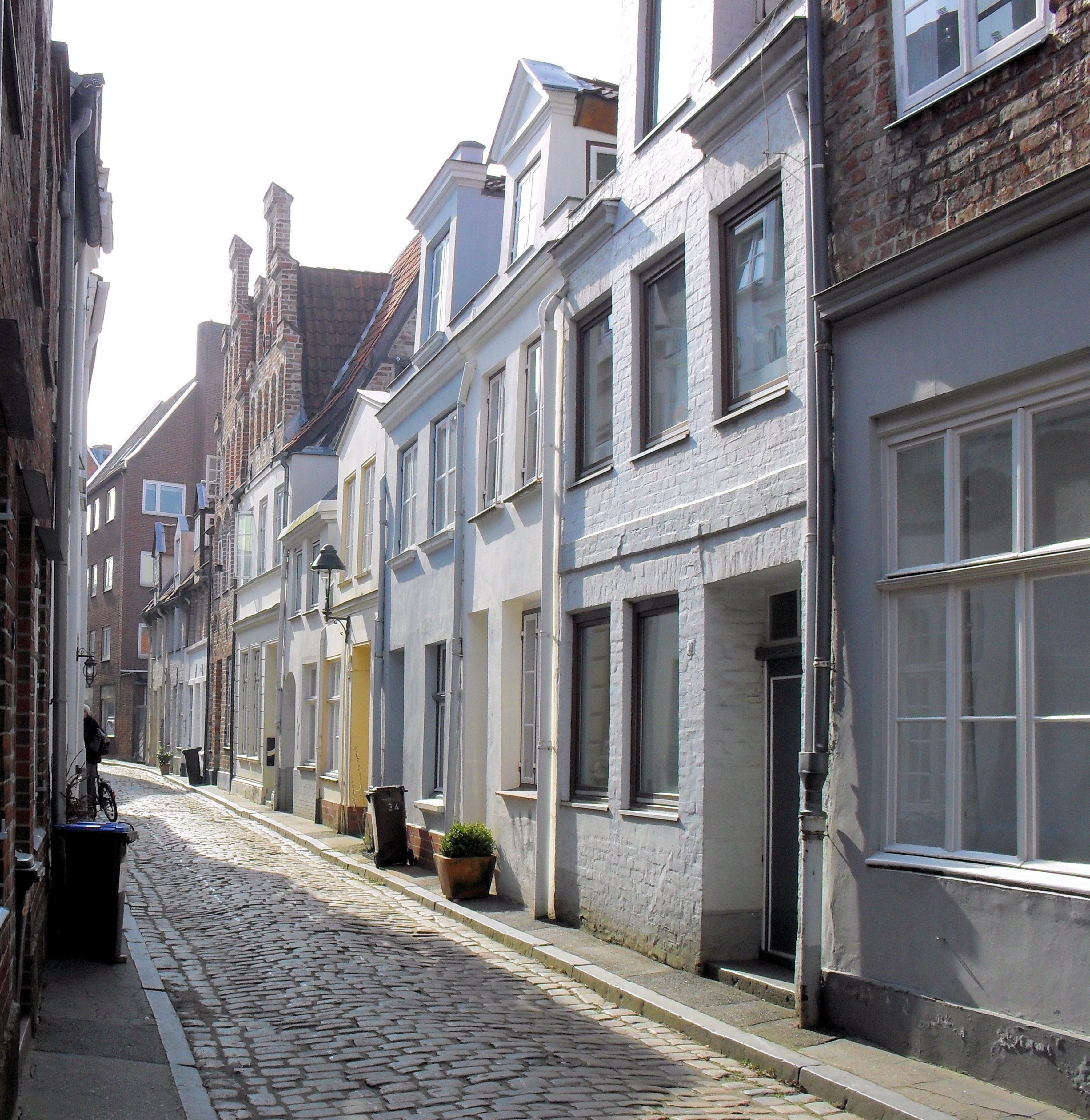 Die Große Kiesau in Lübeck